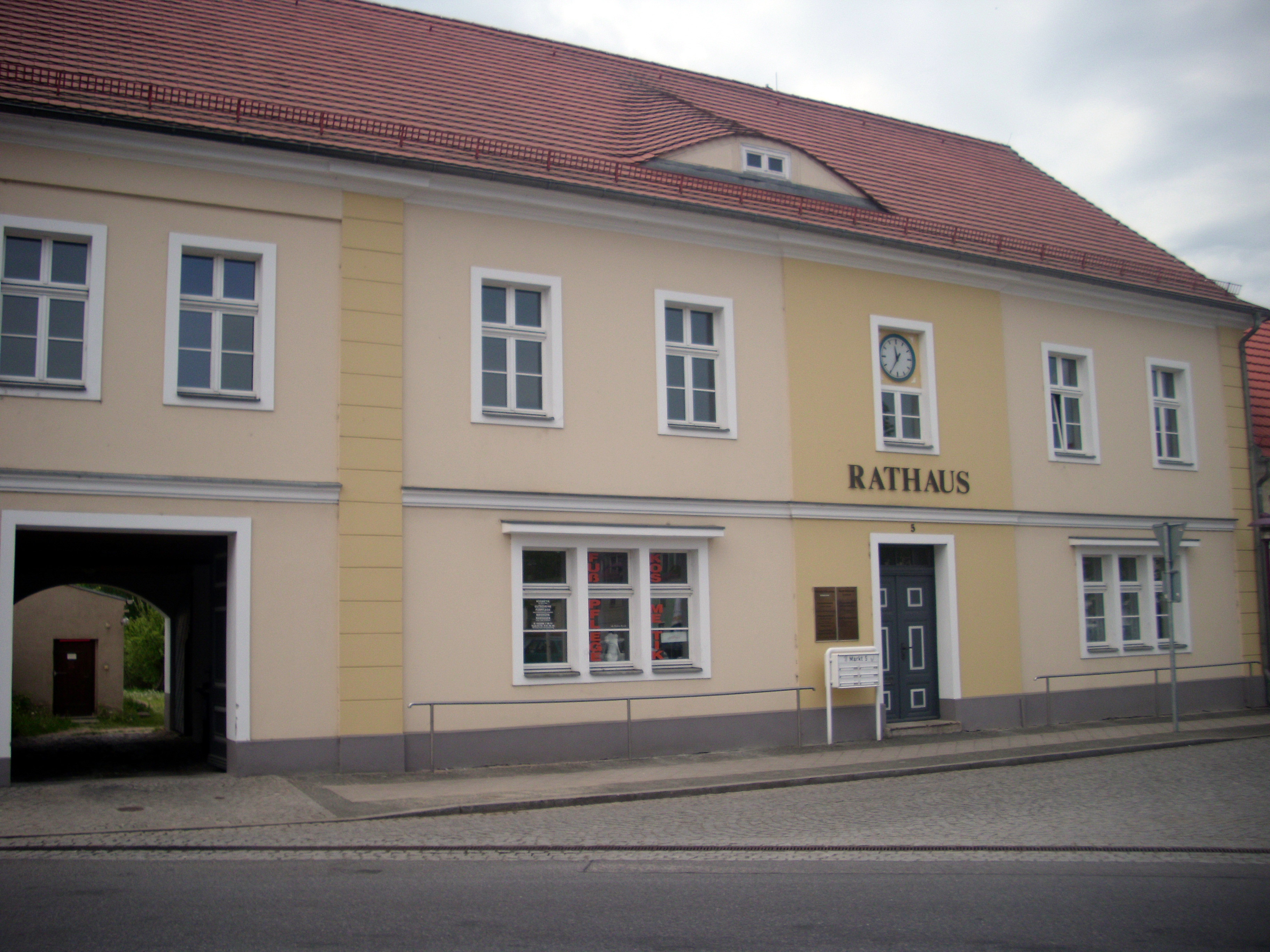 Altes Rathaus Müllrose